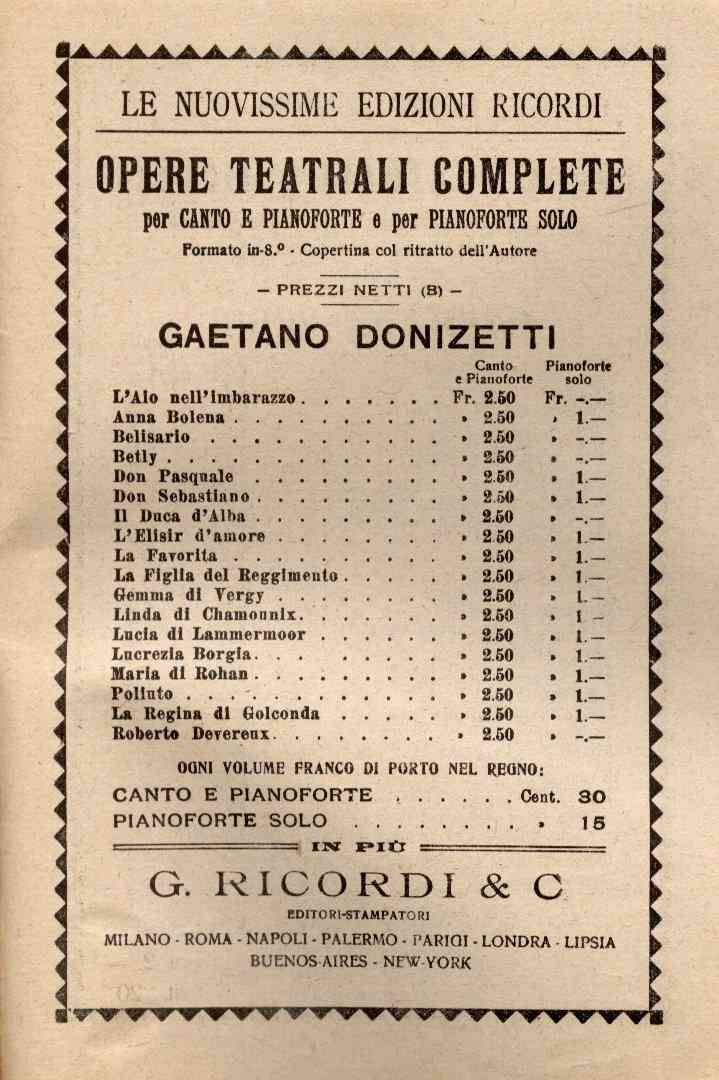 Le nuovissime edizioni Ricordi - opere teatrali complete per canto e pianoforte solo - prezzi netti - Gaetano Donizetti elenco opere pubbicate